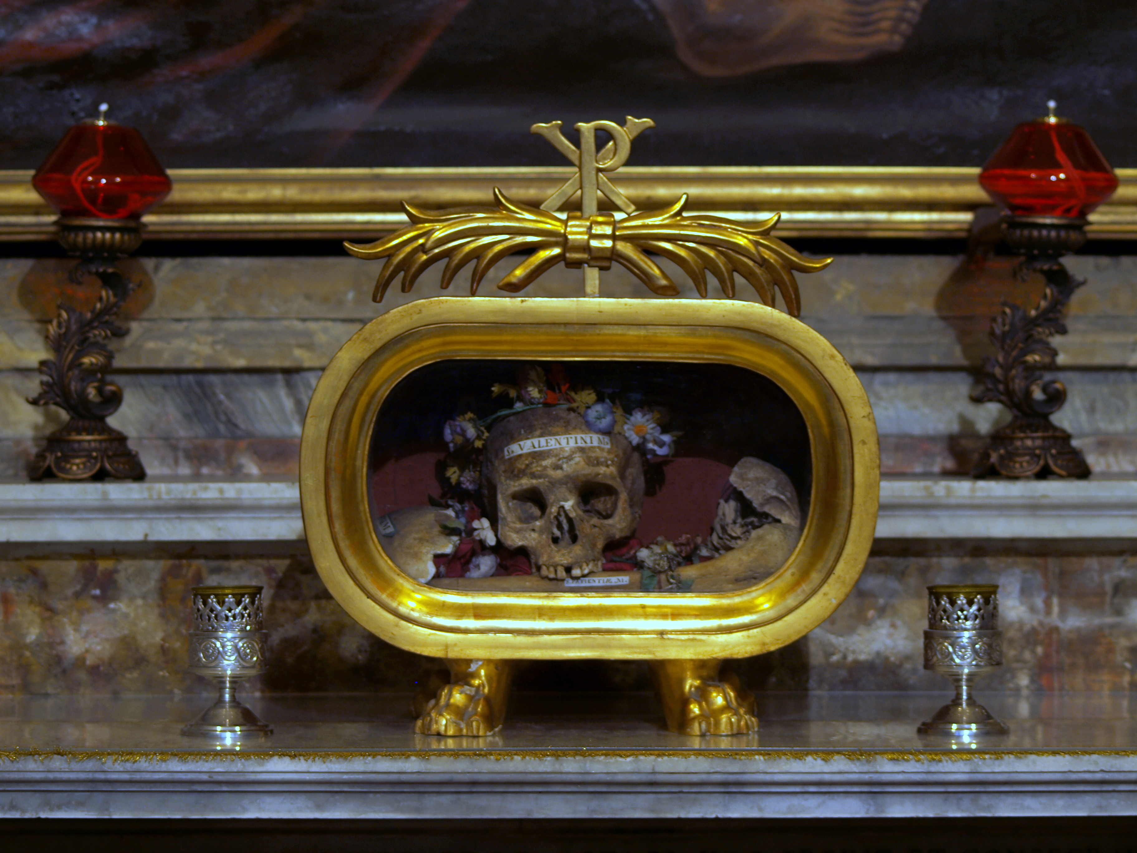 Santa Maria in Cosmedin (Rome)